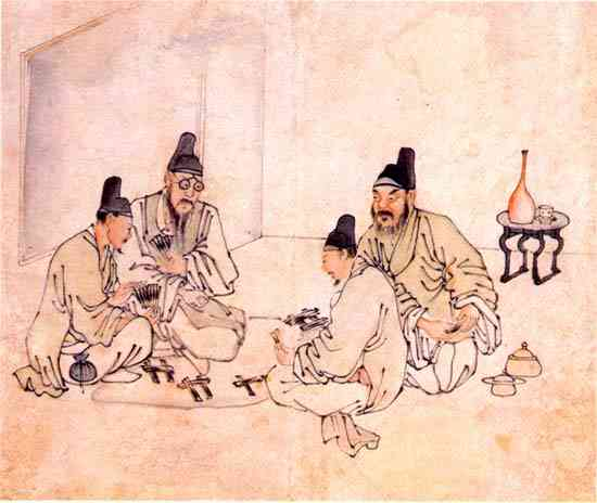 투전도 (鬪錢圖) 종이에 담채, 22.4 x 27cm, 간송미술관